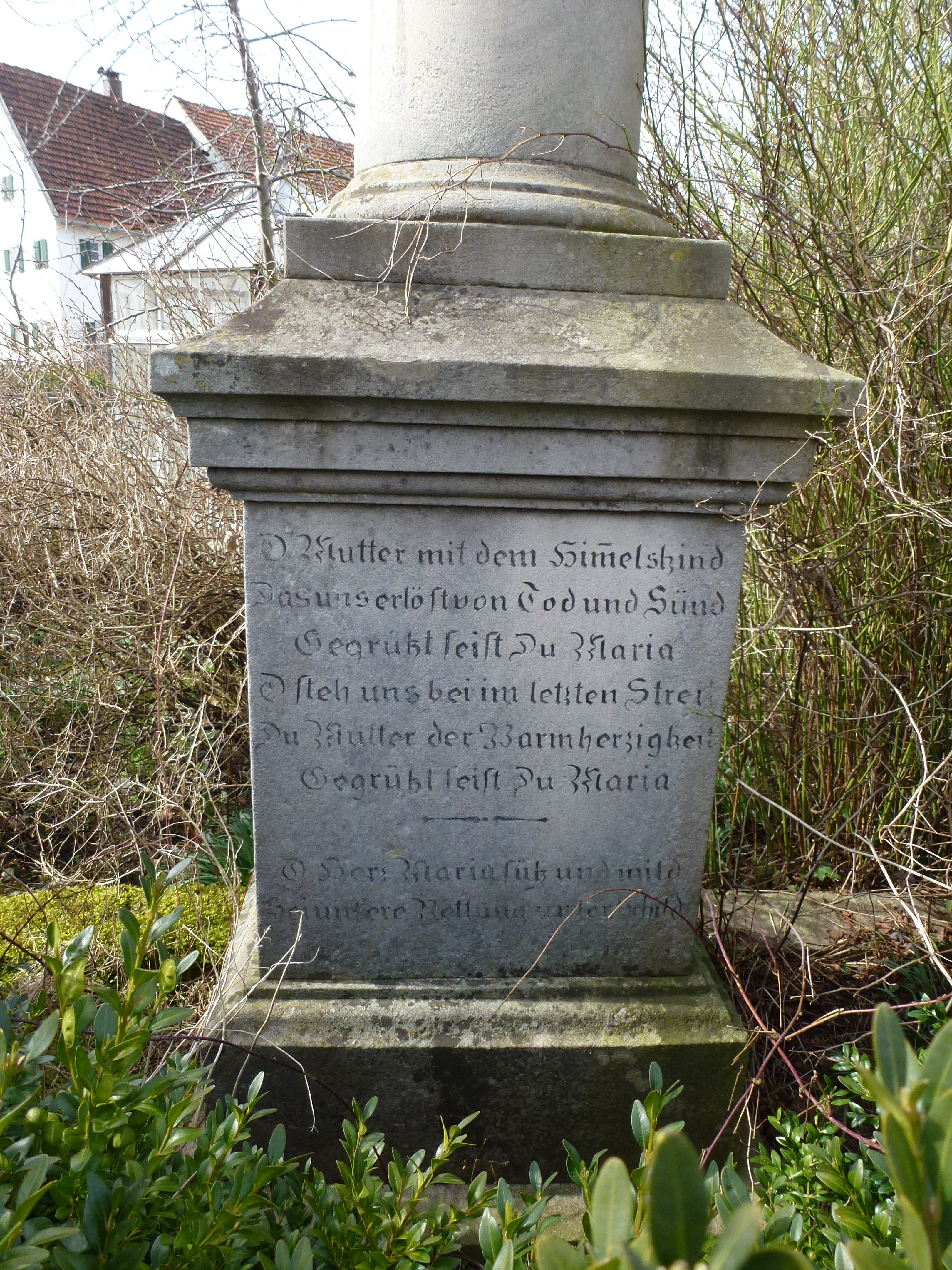 Windach_Landsberger Str7 Mariensäule. Detail: Sockel-Inschrift = O Mutter mit dem Himmelskind / Das uns erlöst von Tod und Sünd /Gegrüßt seist Du Maria / O steh uns bei im letzten Streit / Du Mutter der Barmherzigkeit / Gegrüßt seist Du Maria / / O Herz Maria süß und mild /sei unsere Rettung unser Schild